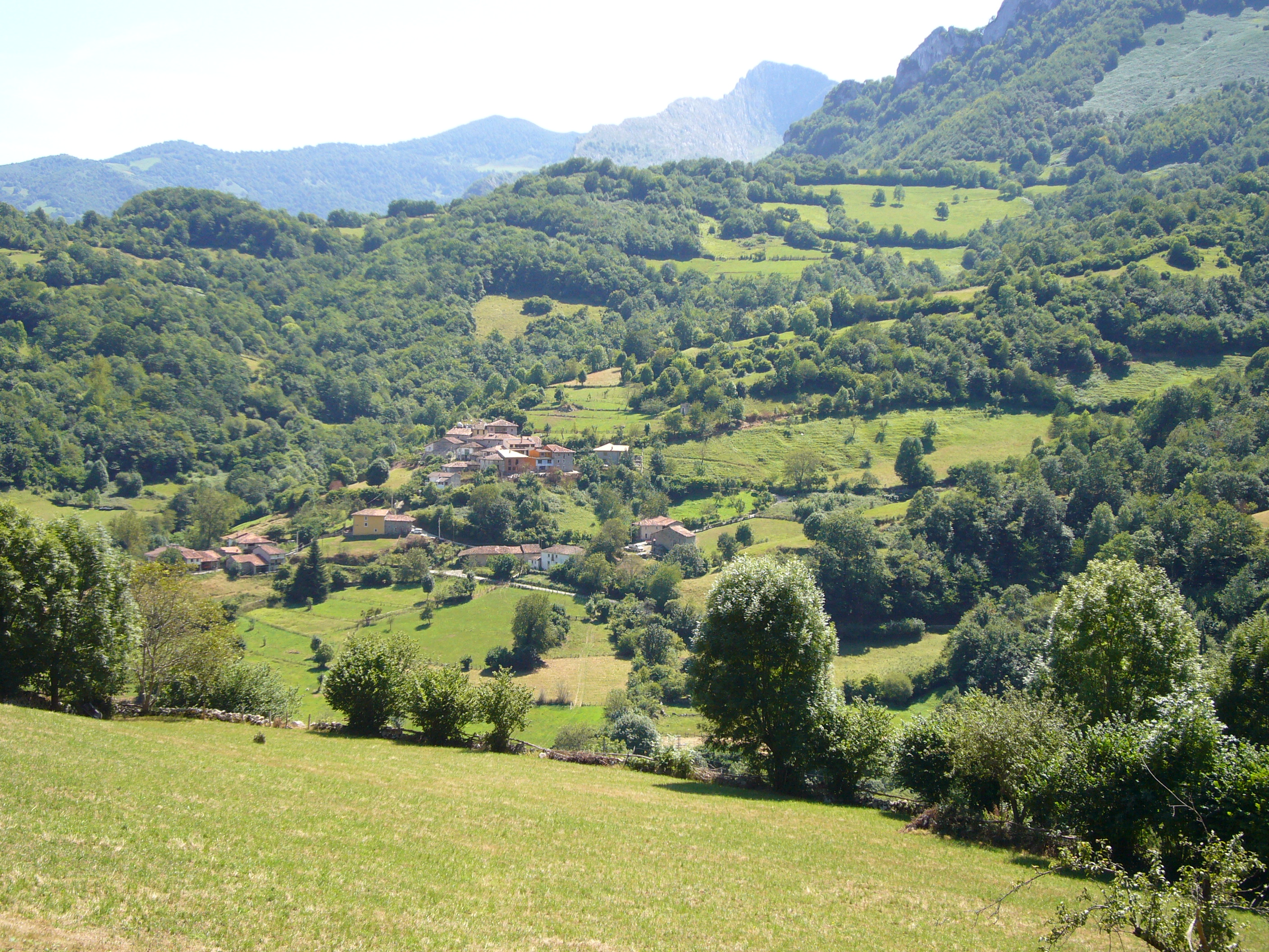 Foto de Tanda